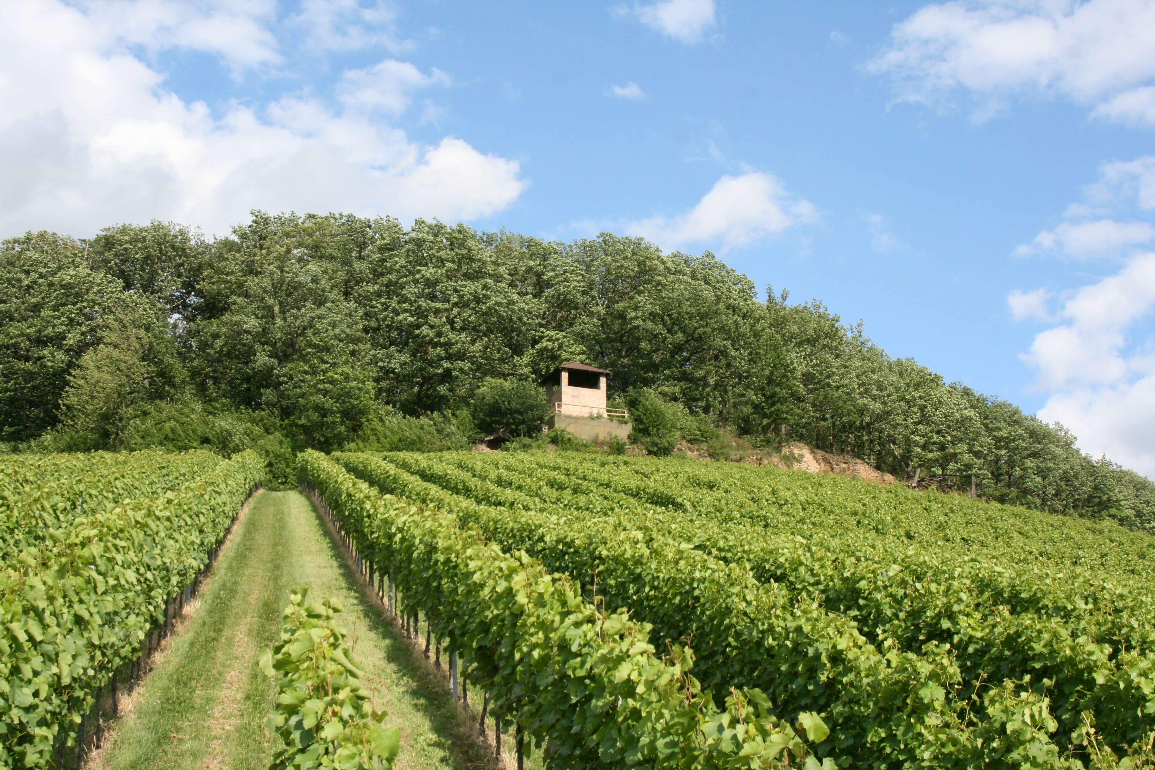 Die Aussichtshütte bei der Ludwigsschanze auf dem Schweinsberg in Heilbronn, von unten gesehen